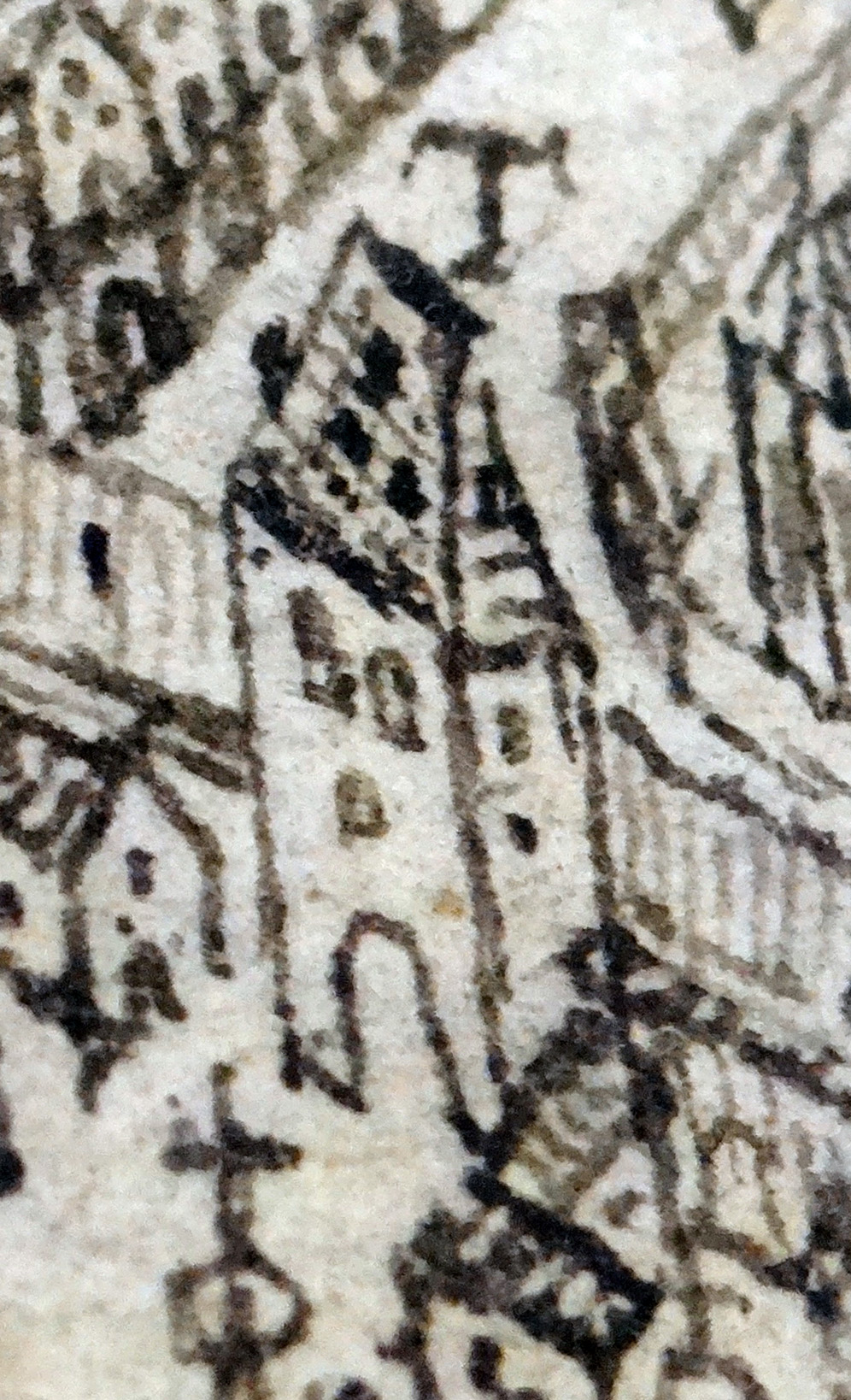 Andreastor, Worms, vor 1689. Detail aus: Peter Hamman: Statt Wormbß wie selbige 1631 vor dem Schwedischen Ruin der Vorstätt [...] verblieben. Stadtarchiv Worms, Abt. 1B, Nr. 48.